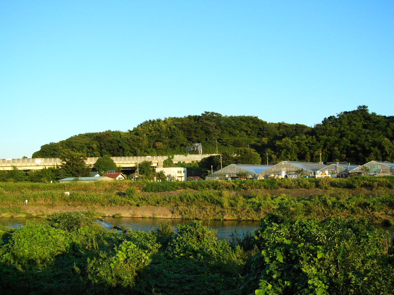 Kozukue Castle